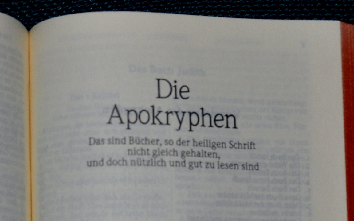 Apocriefe boeken Lutherbijbel